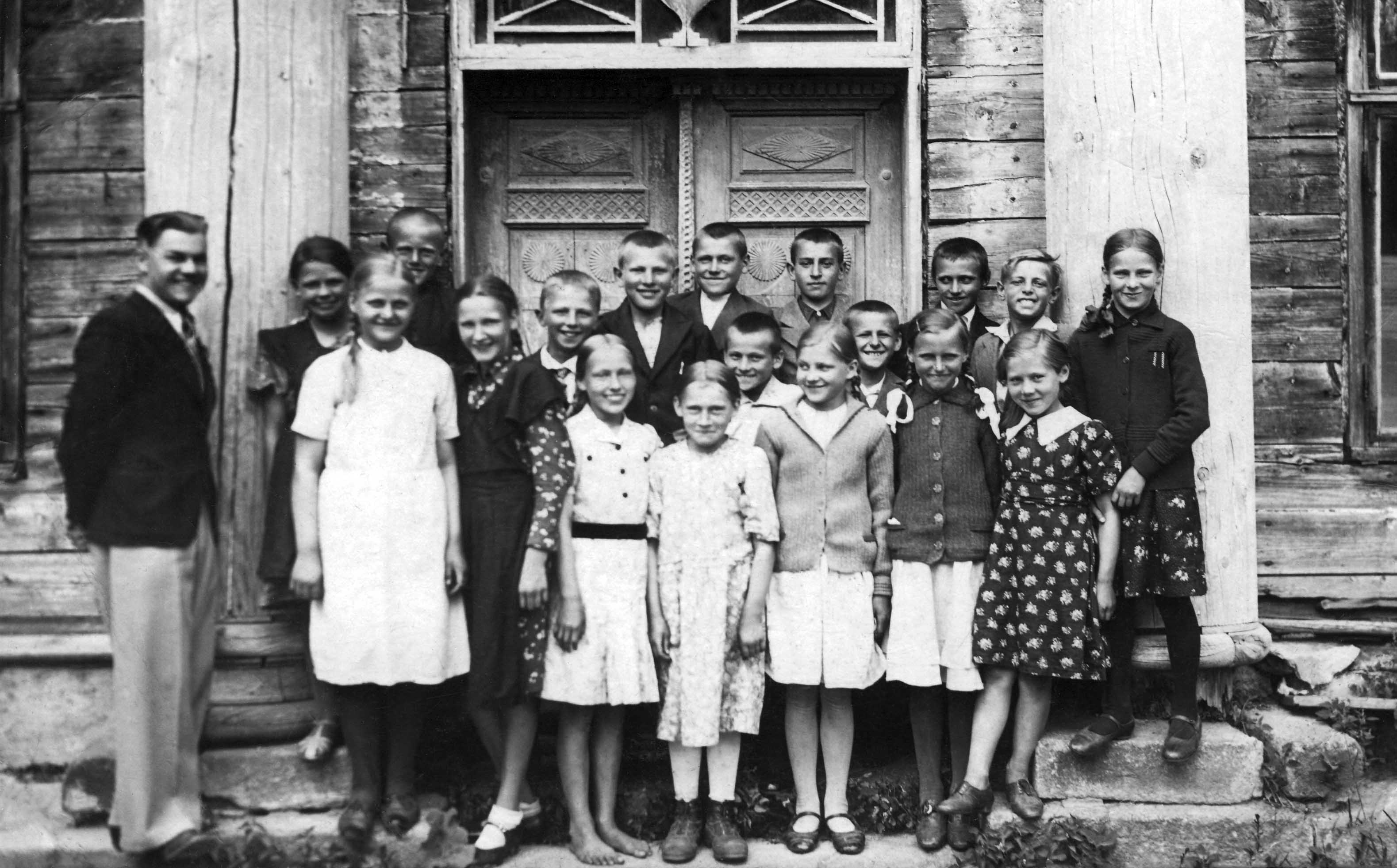 Mokytojas Kriščiukas su Velykionių keturmetės mokyklos mokiniais. 1938 m.